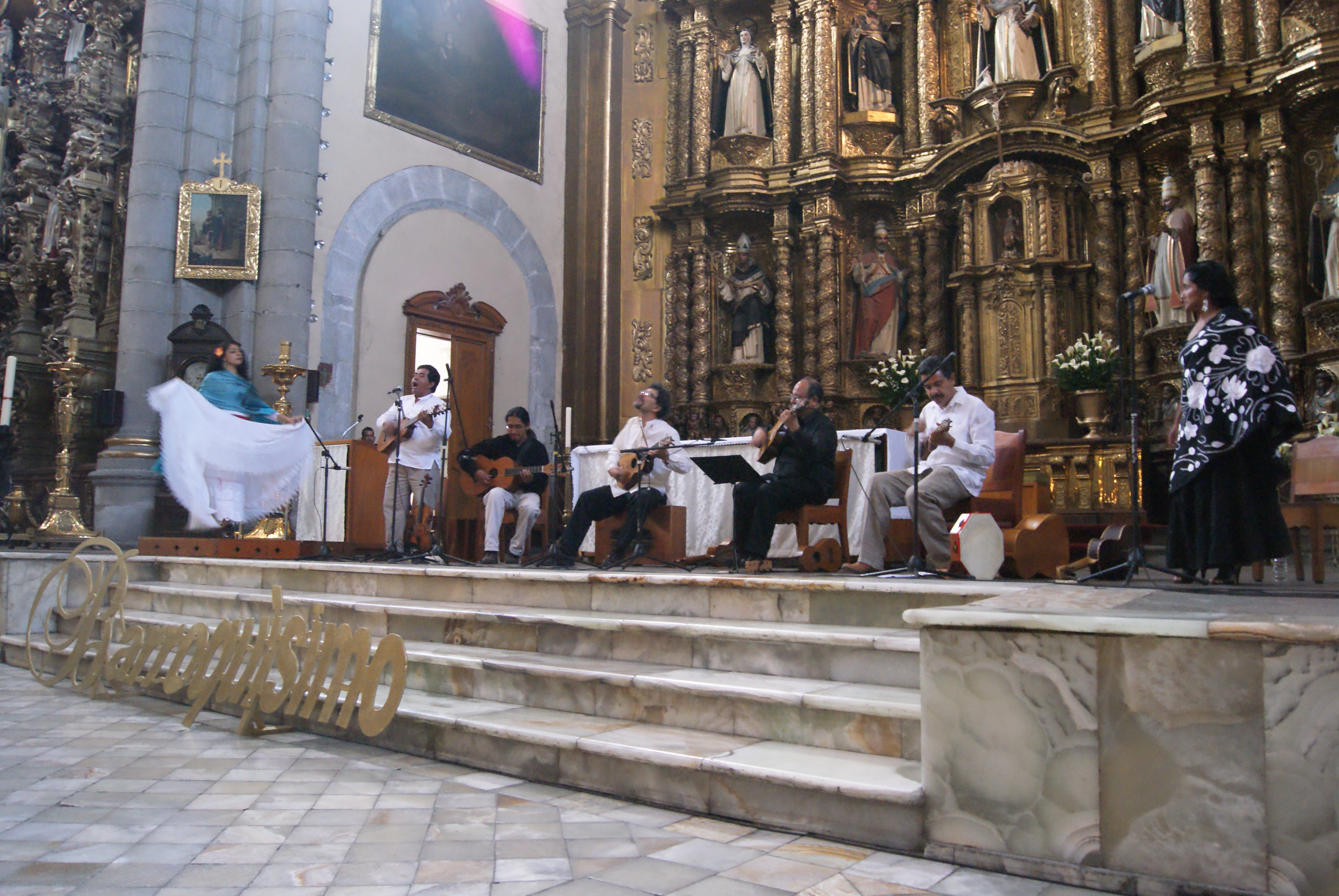 Tembembe Ensamble Continuo en concierto en el Templo de Santo Domingo, durante el Festival Barroquísimo, Puebla, 2010